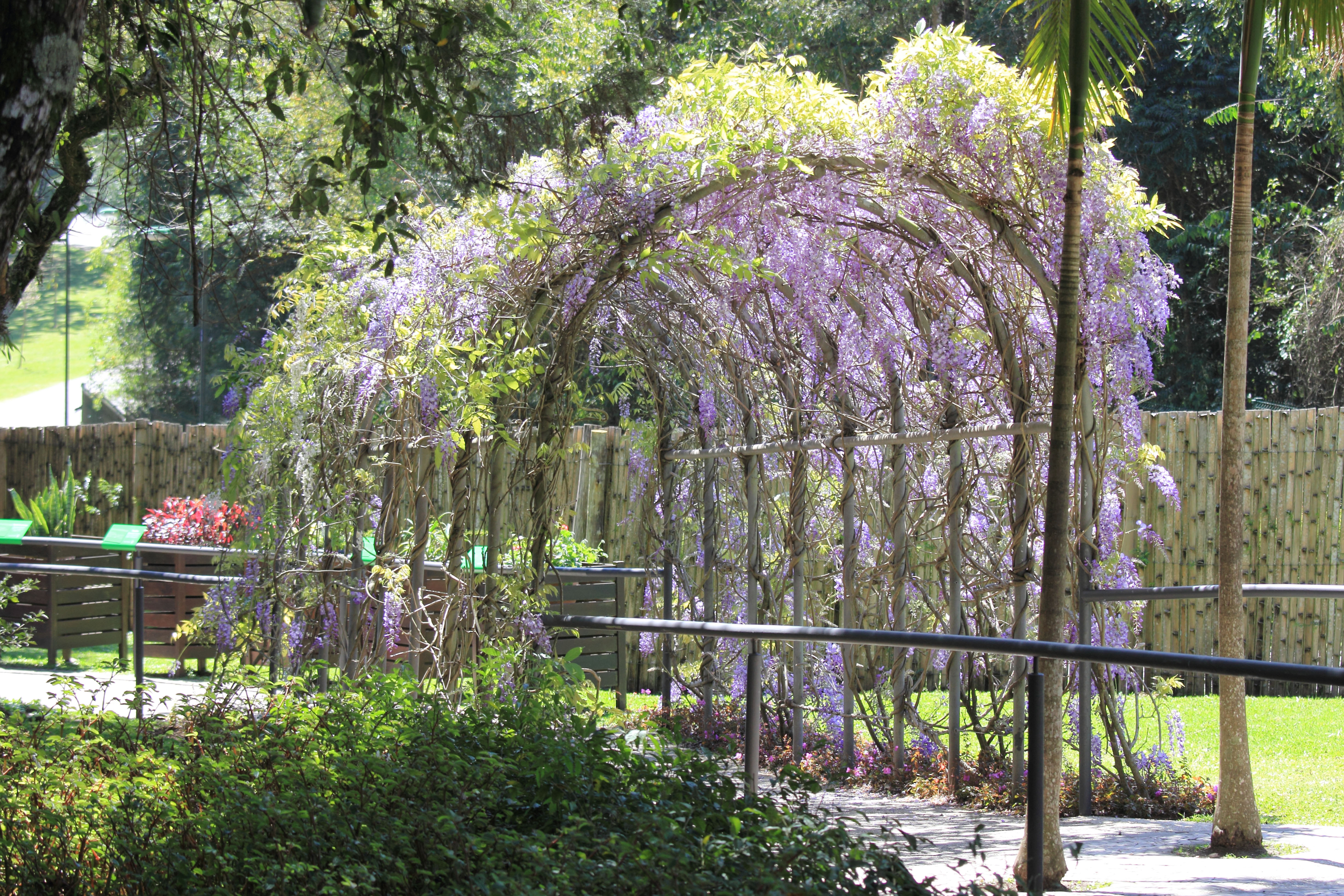 Jardim Botânico Fanchette Rischbieter em Curitiba